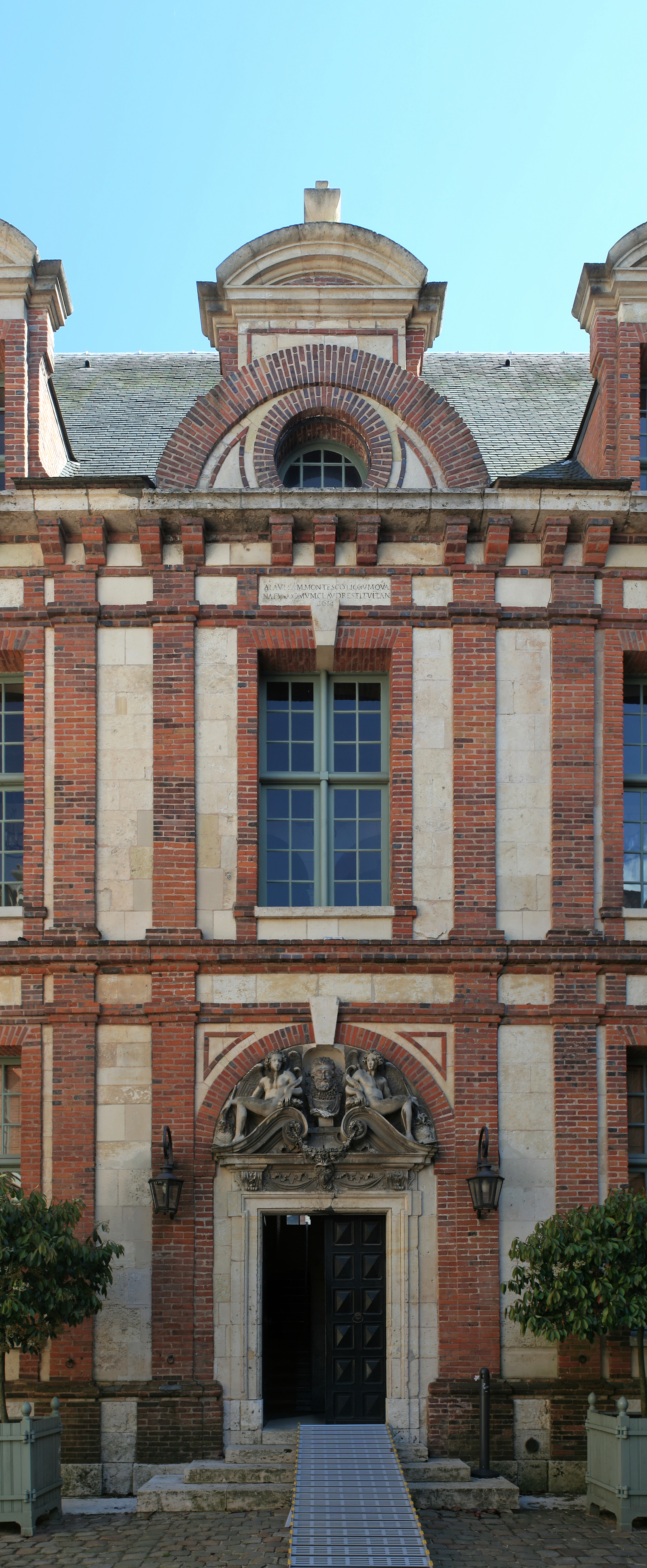 Chartres, hôtel Montescot : travée de l'entrée principale sur cour. .